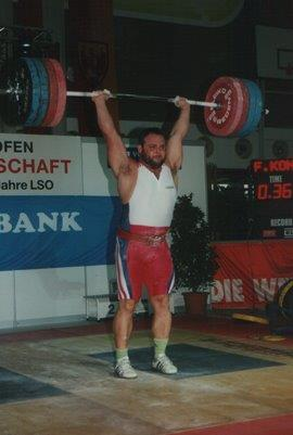 Staaatsmeisterschaften in Braunau 1997